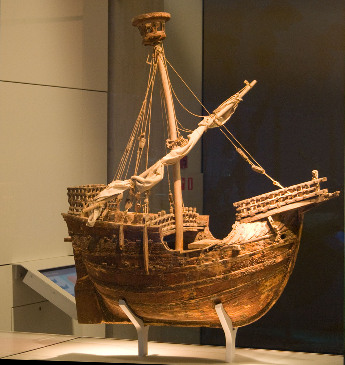 Mataro Model